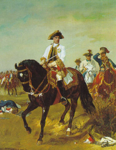 Ernst Freiherr von Laudon auf dem Schlachtfeld bei Kunersdorf